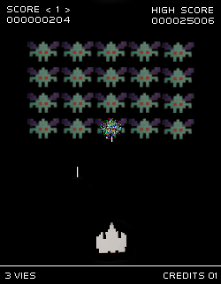 Imitation du jeu Space Invaders. Utilisation de Image:Space Invaders Paris.JPG.